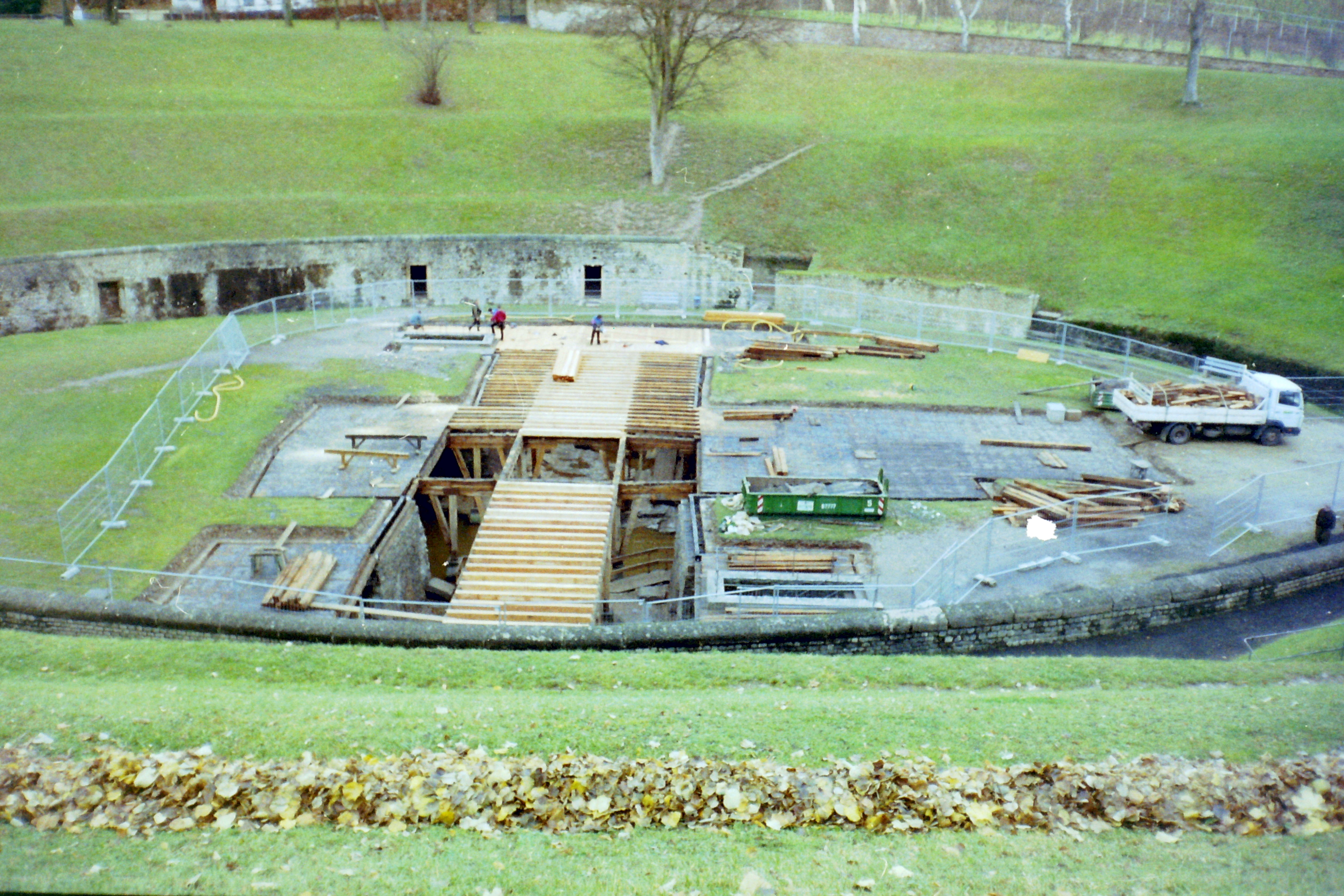 Amphitheater Trier um 100 n. Chr. Erste Freilegungs- und Grabungsarbeiten des Amphitheaters begannen ab 1816. Die Holzdecke über dem Arenakeller wurde aus statischen Gründen 1992-1993 erneuert. Für zukünftige kulturelle Veranstaltungen wurden Infrastrukturmaßnahmen für Strom, Wasser und Abwasser geschaffen.